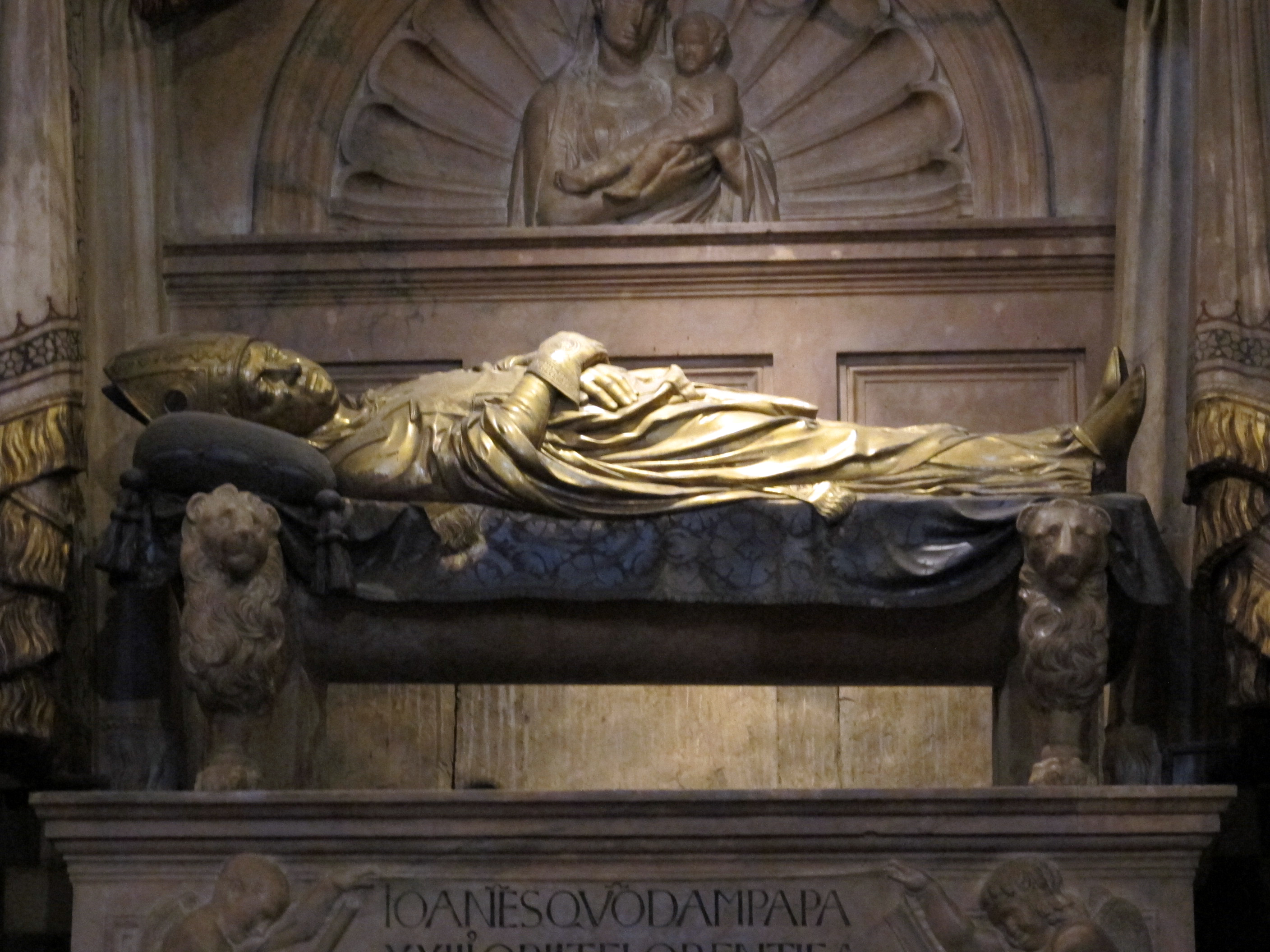 Tomba dell'antipapa giovanni xxiii